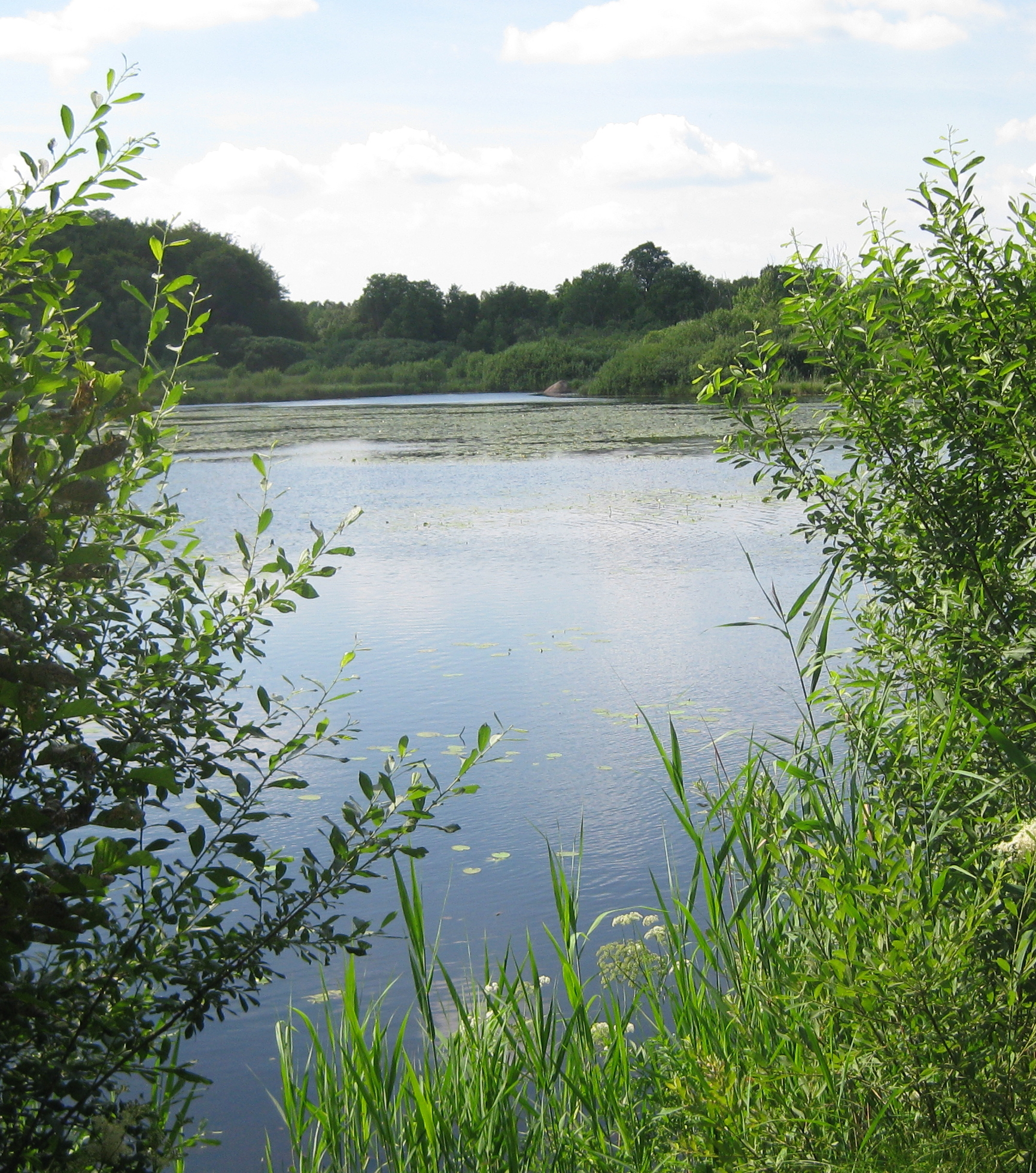 Korsarödssjön